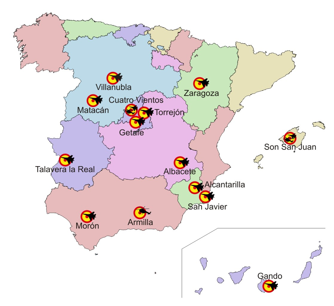 Bases Aéreas del Ejército del Aire de España